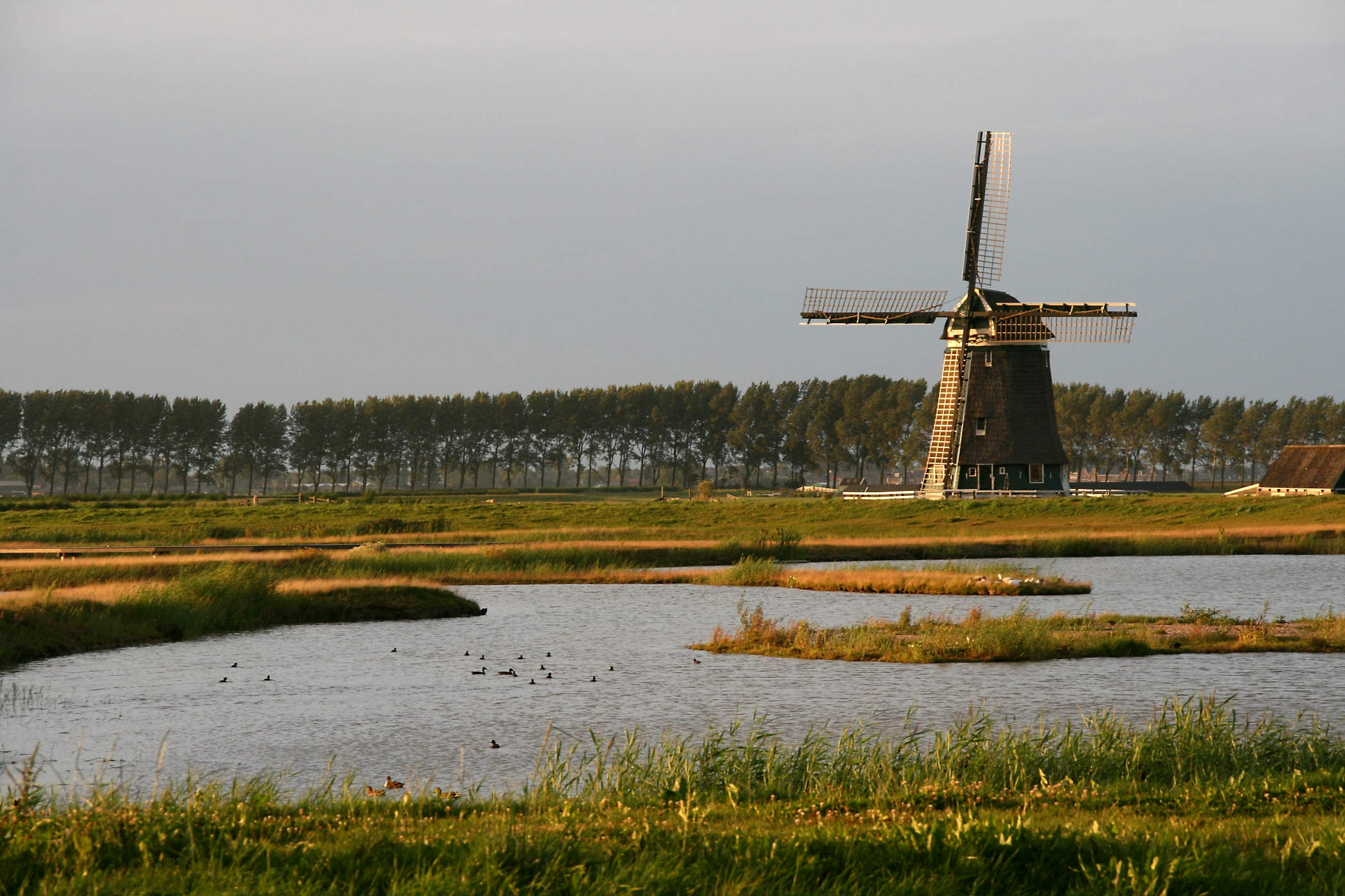 Wogmeer: molen Nieuw Leven in avondlicht